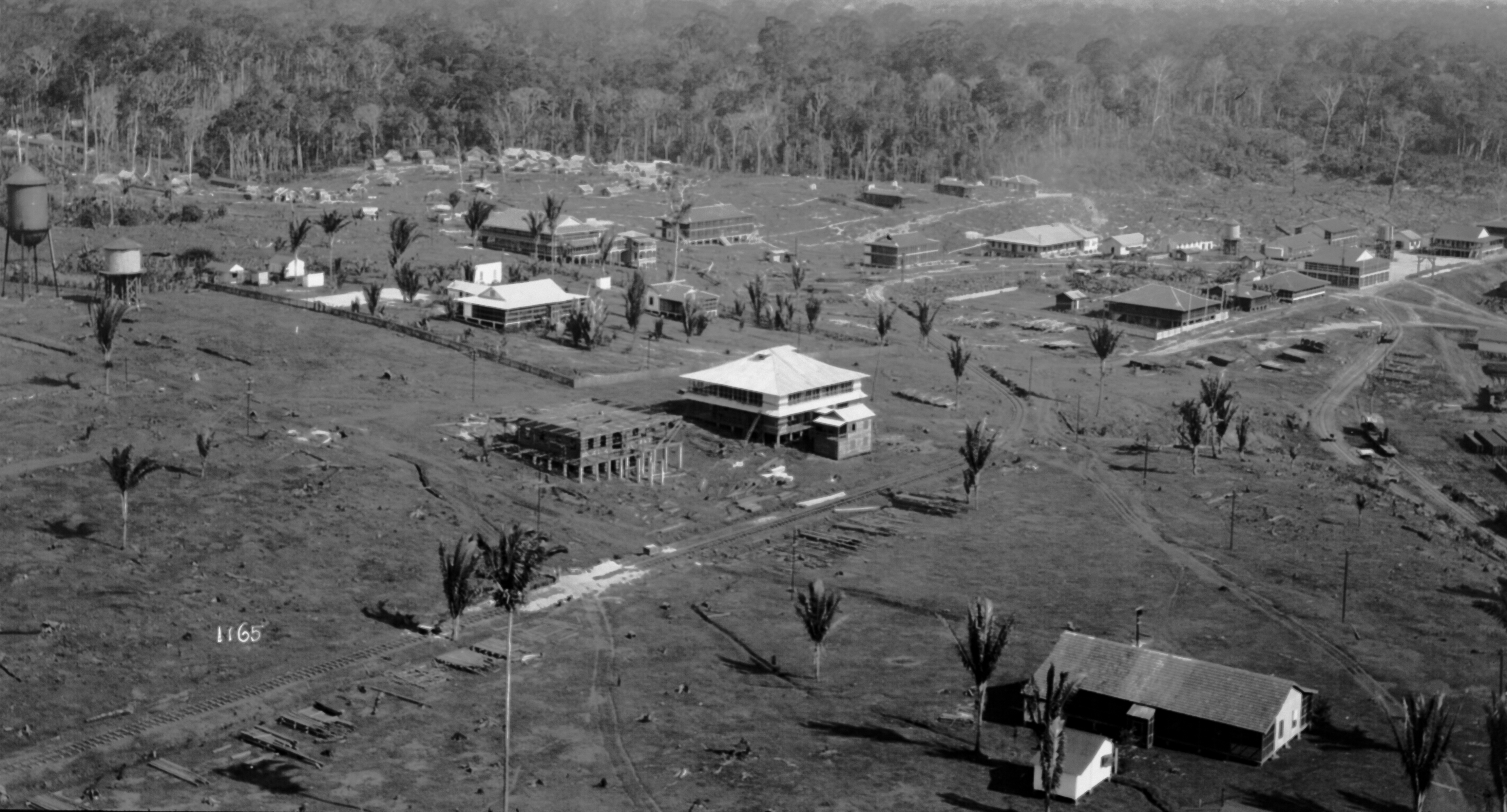 Obra que integra o acervo do Museu Paulista da USP. Coleção Dana Merrill.